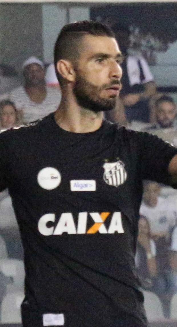 Foto: Douglas Teixeira/Futebol Santista